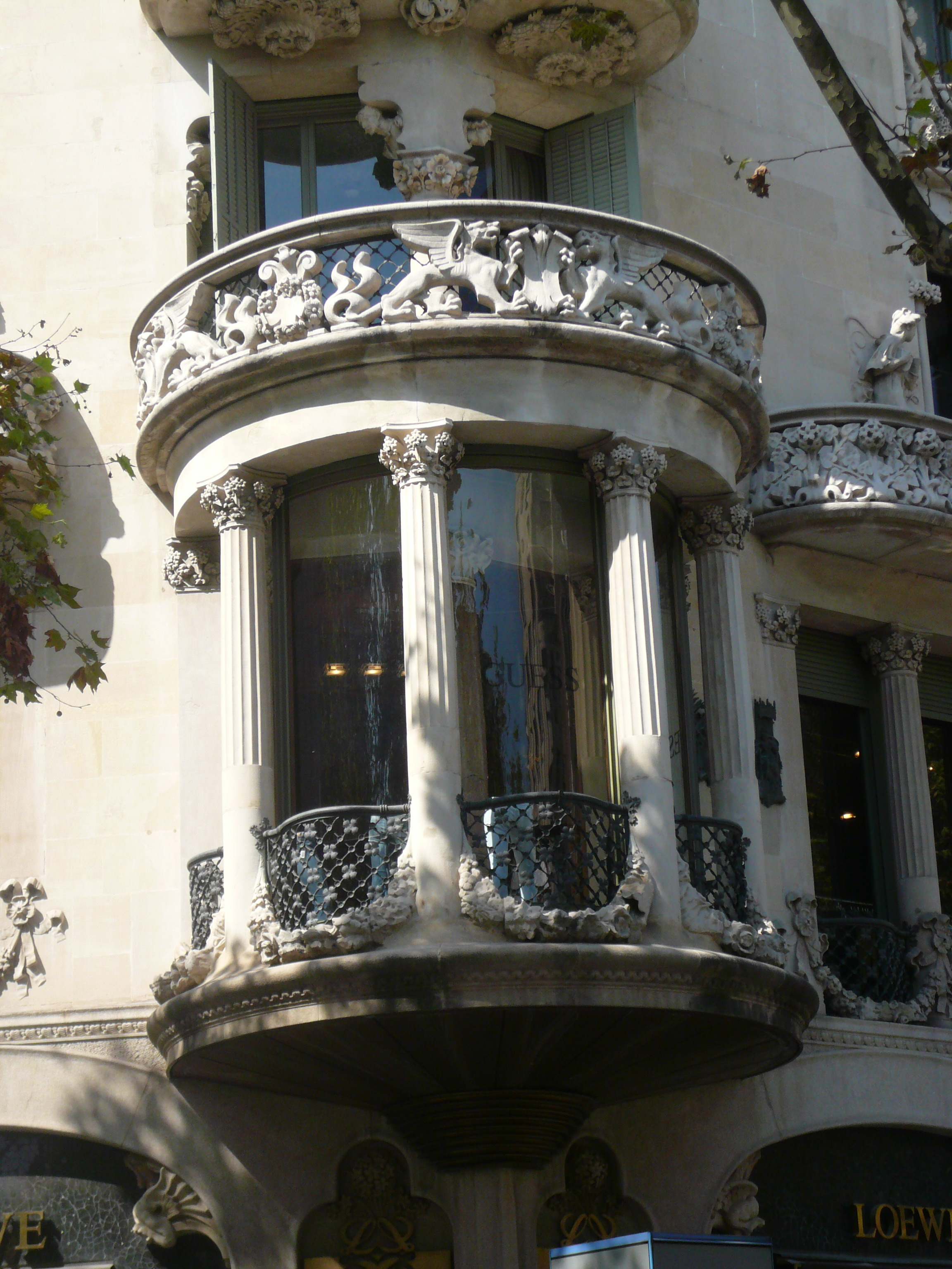 Casa Lleó Morera (Barcelona)